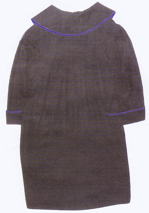 Tył togi radcy prawnego